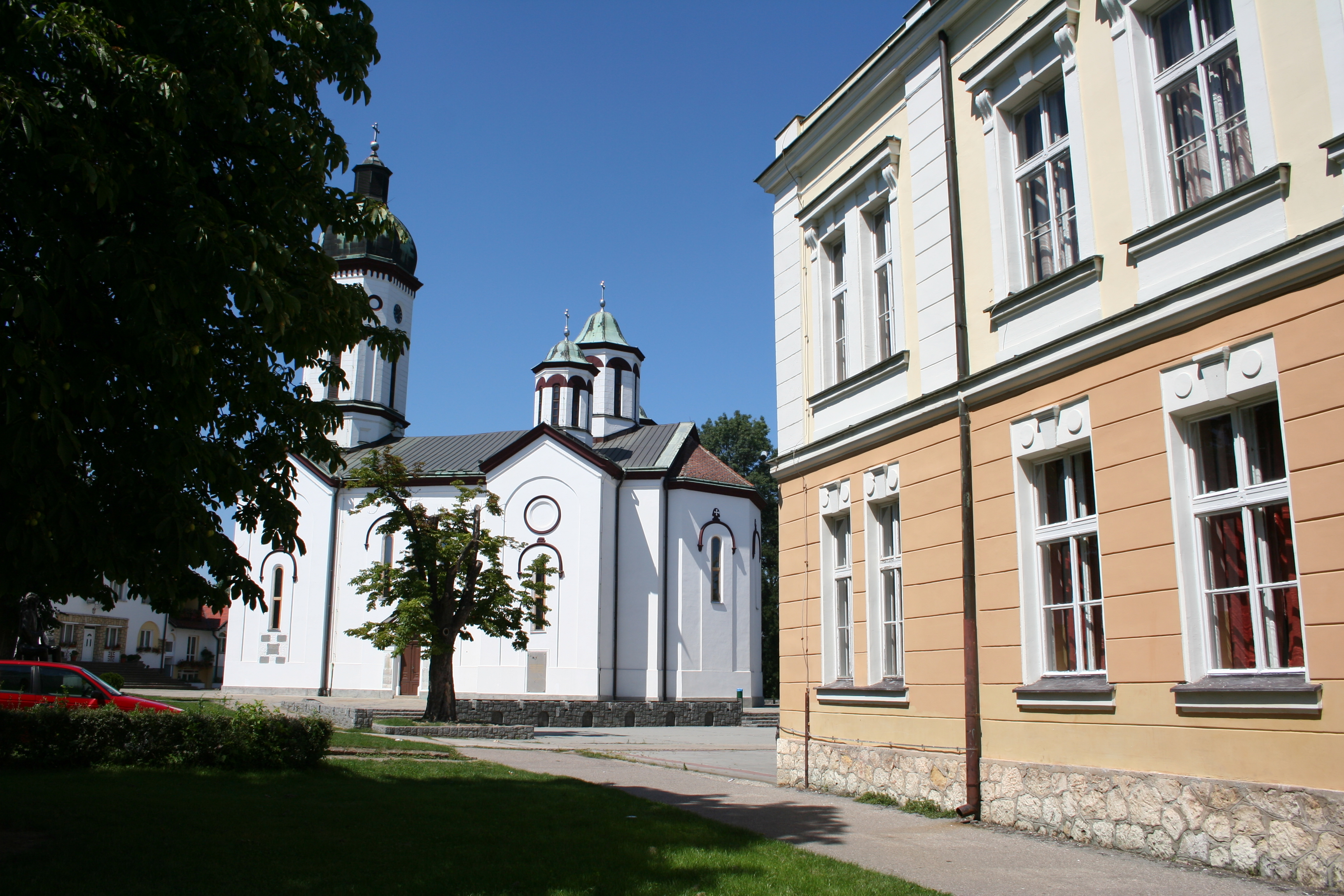 Crkva Pokrova Presvete Bogorodice, Loznica